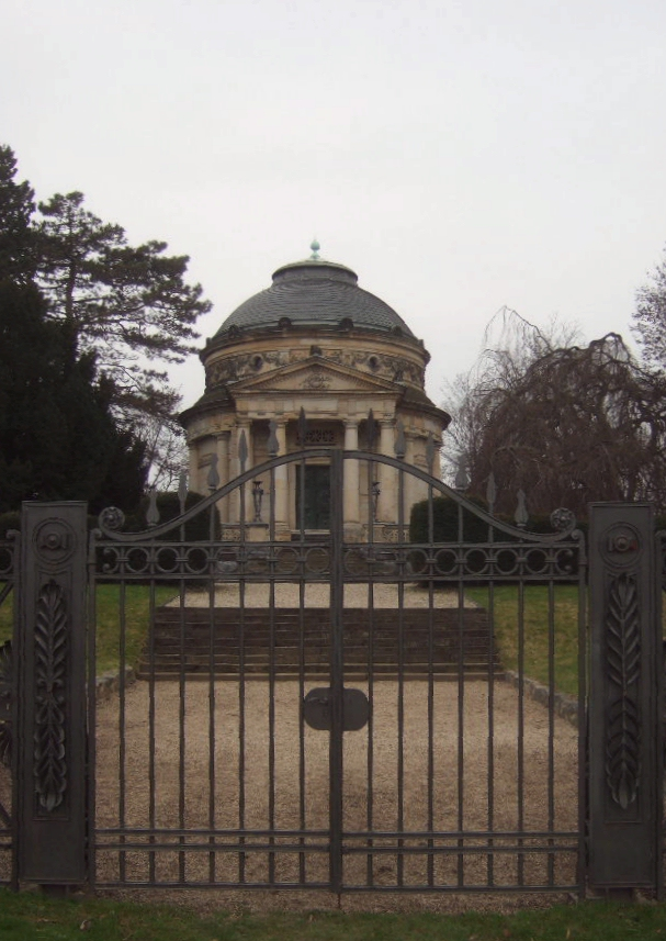 Mausoleum von Carstanjen, Auerhofstraße, Plittersdorf, Bad Godesberg